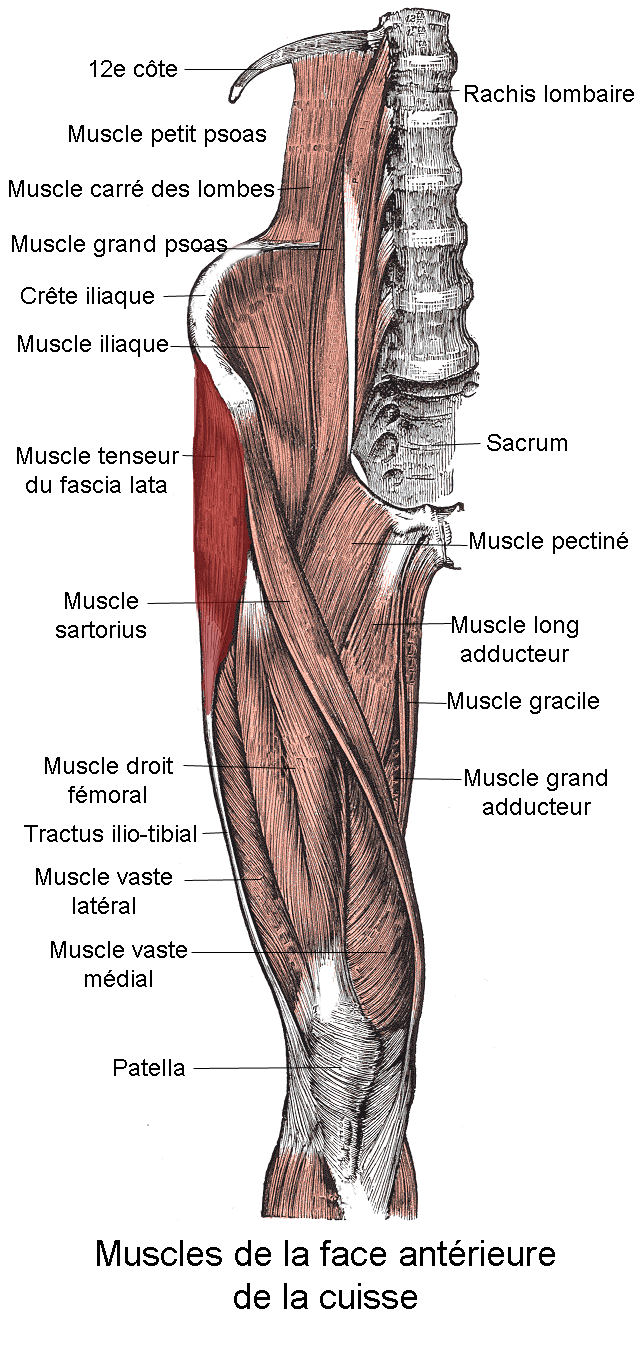 Muscle tenseur du fascia lata. Anatomie humaine.